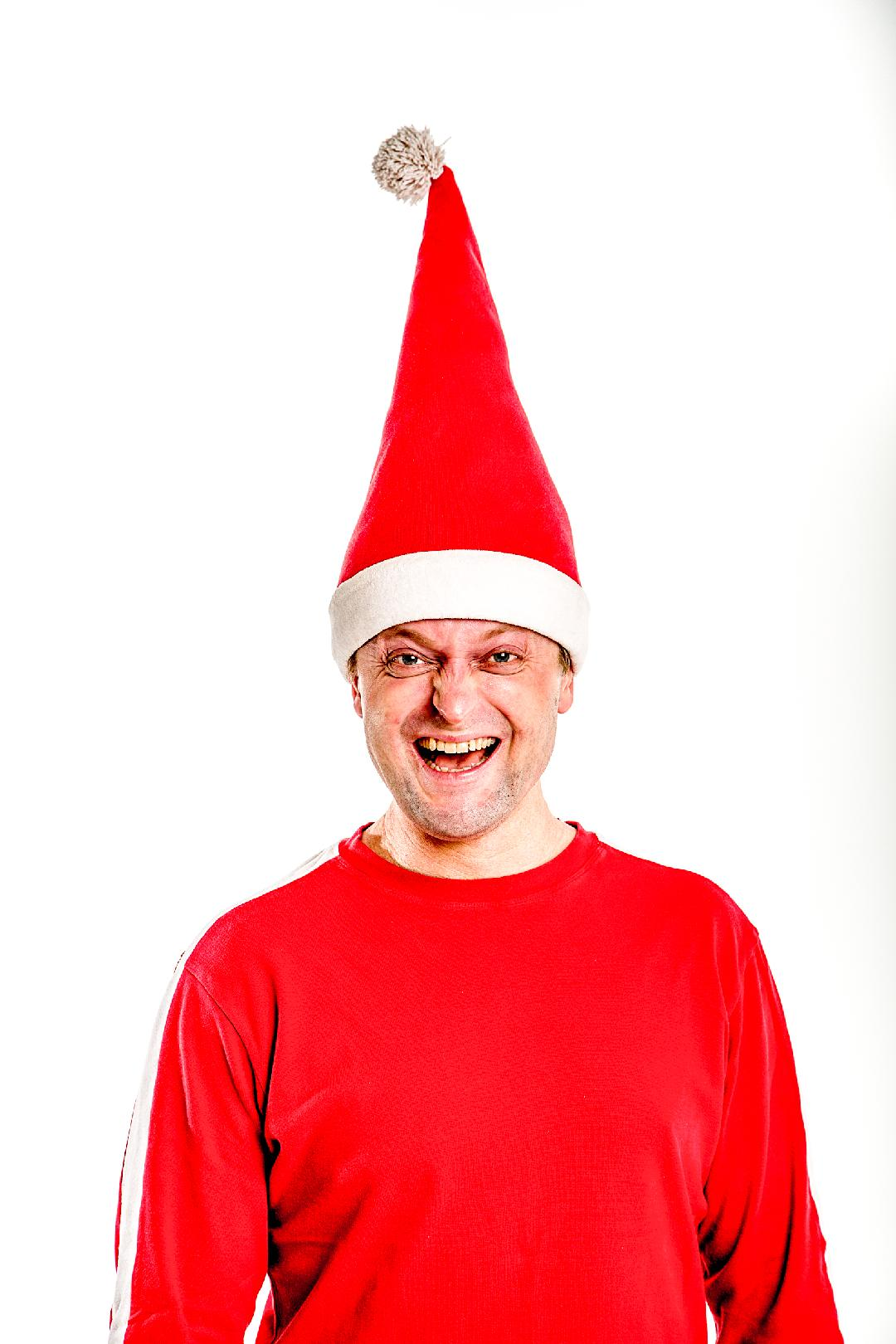 Bildet tilhører Svartnissen AS